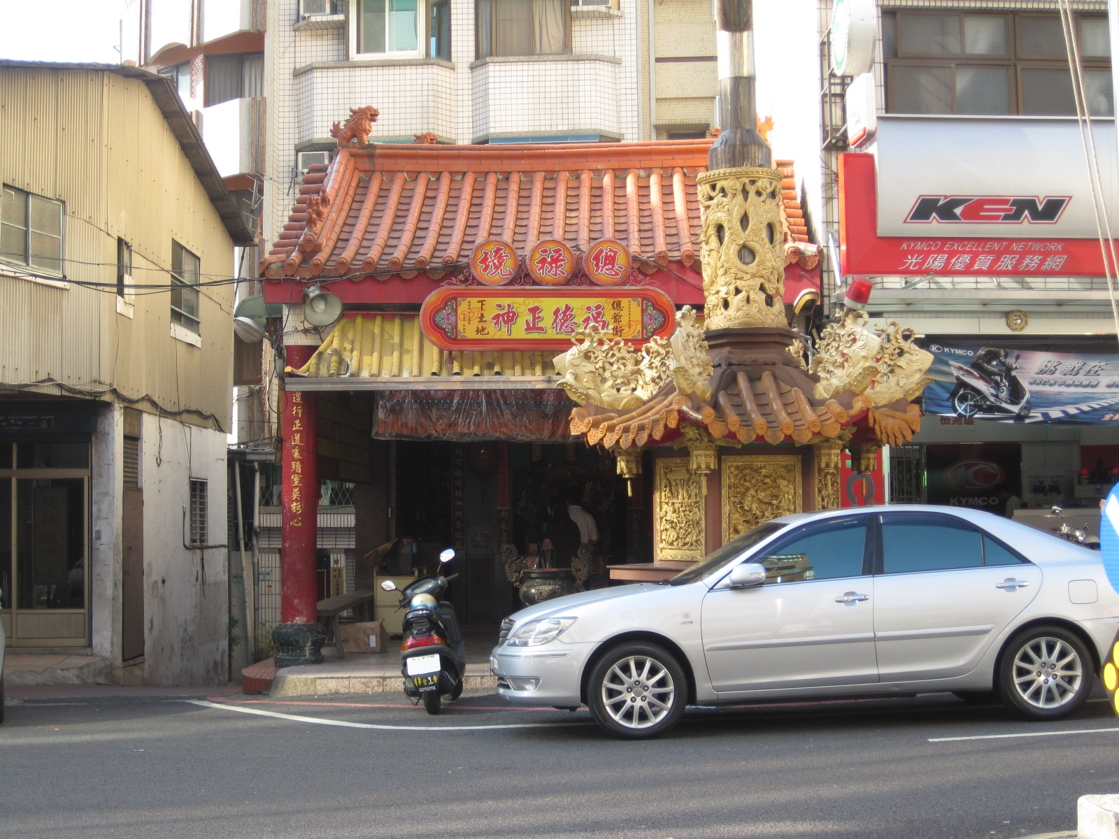 臺南市總爺古街的總祿境土地廟。